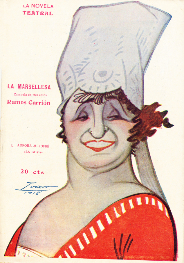 Caricatura de Aurora M. Jofré (La Goya).